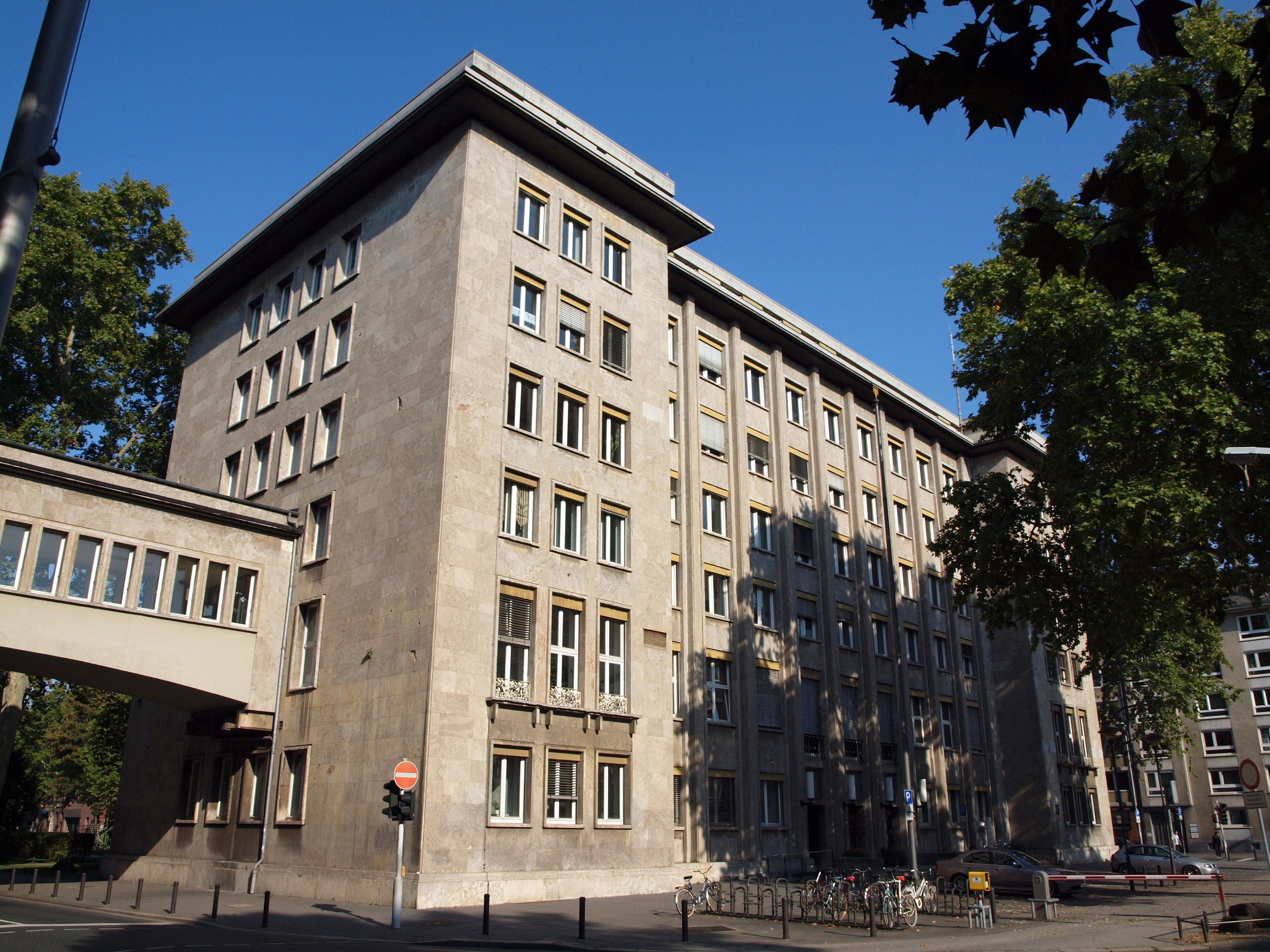 Das Stadthaus, früher Reichsbahndirektion, in der Nähe des Mainzer Hauptbahnhofes ist heute u.a. Sitz des Standesamtes.